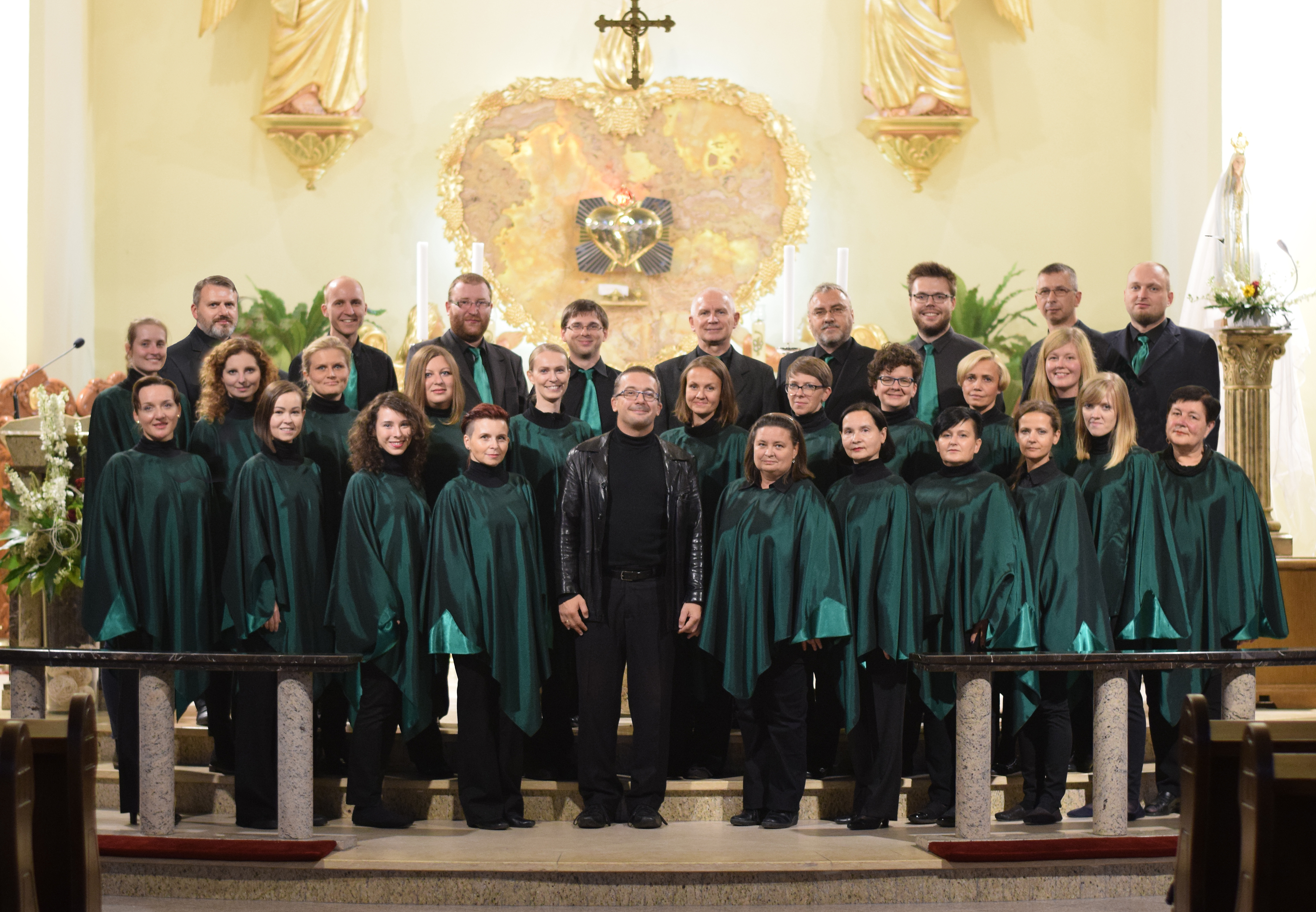 Kameralny Chór Misericordia w roku 2017 obchodzi Jubileusz działalności artystycznej.